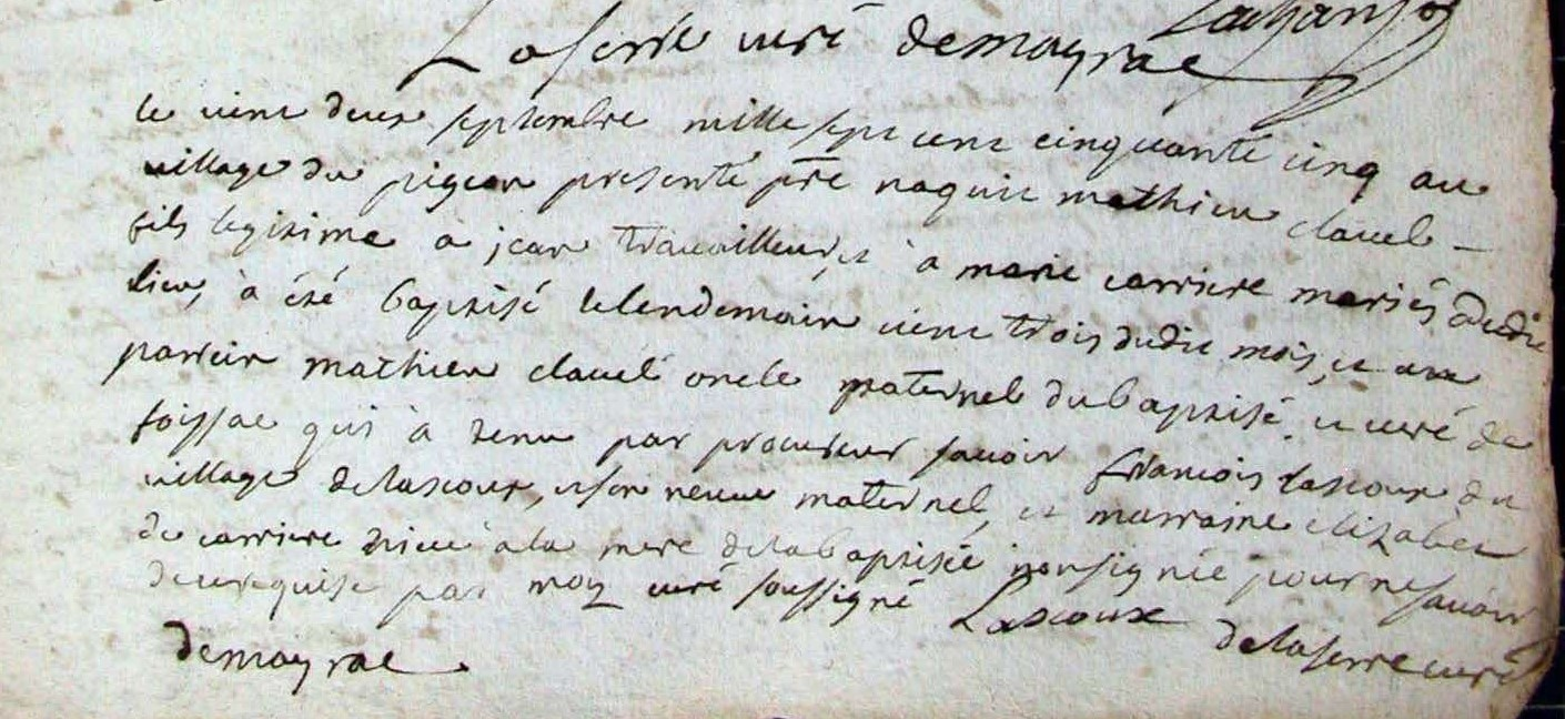 Copie de l'acte de baptême de Mathieu Clavel né au lieu-dit le Pigeon le 22 septembre 1755 et baptisé à Mayrac le 23 septembre 1755 , Archives départementales du Lot (France) cote 4E272 0115